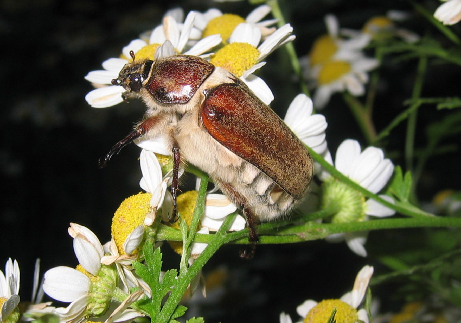 Anoxia villosa, Melolonthidae; Maikäferartige